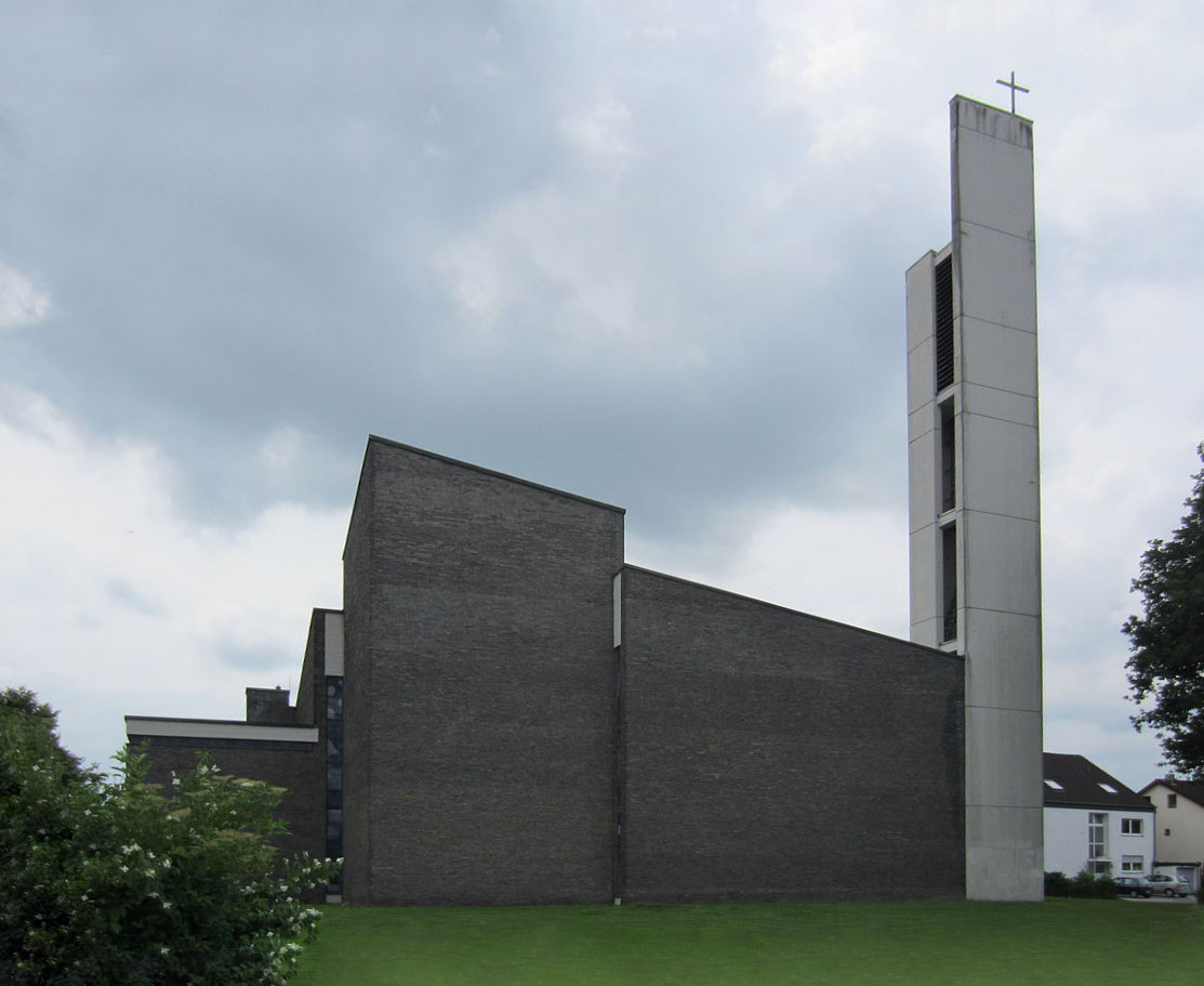 Kirche "Auferstehung Christi" in Leopoldshöhe-Greste von Nord-Osten aus gesehen